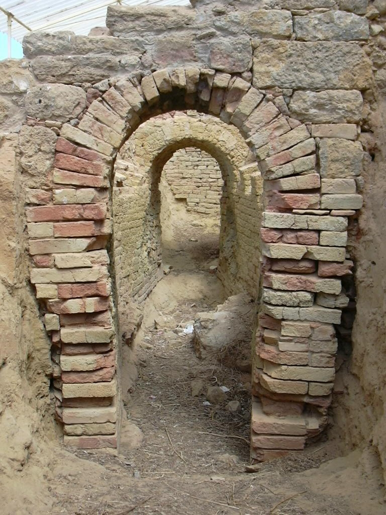 Morgantina:la grande fornace in cui ben visibili sono il vano di cottura e quelli di alimentazione